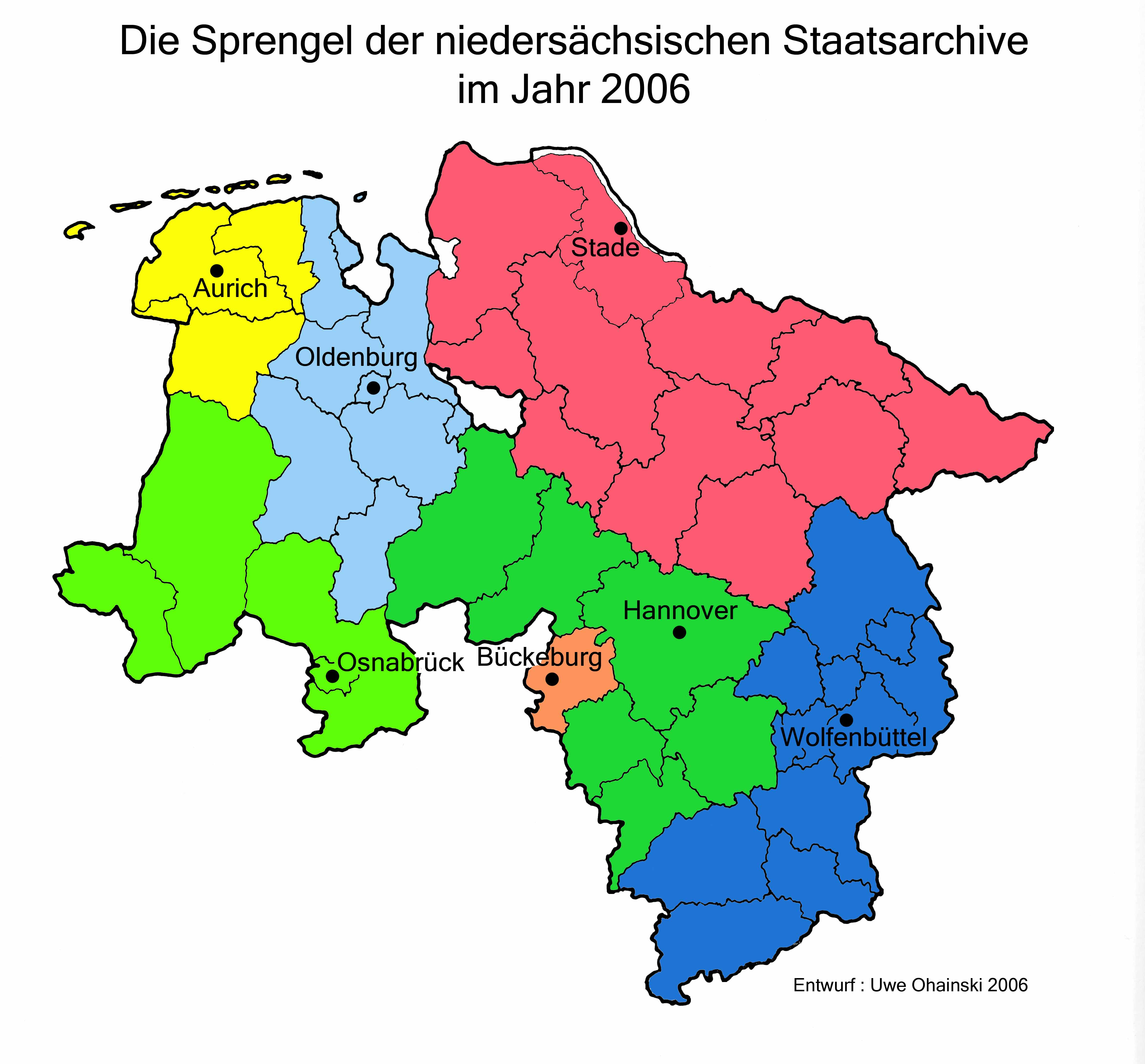 Die Archivsprengel der Staatsarchive des Niedersächsischen Landesarchivs